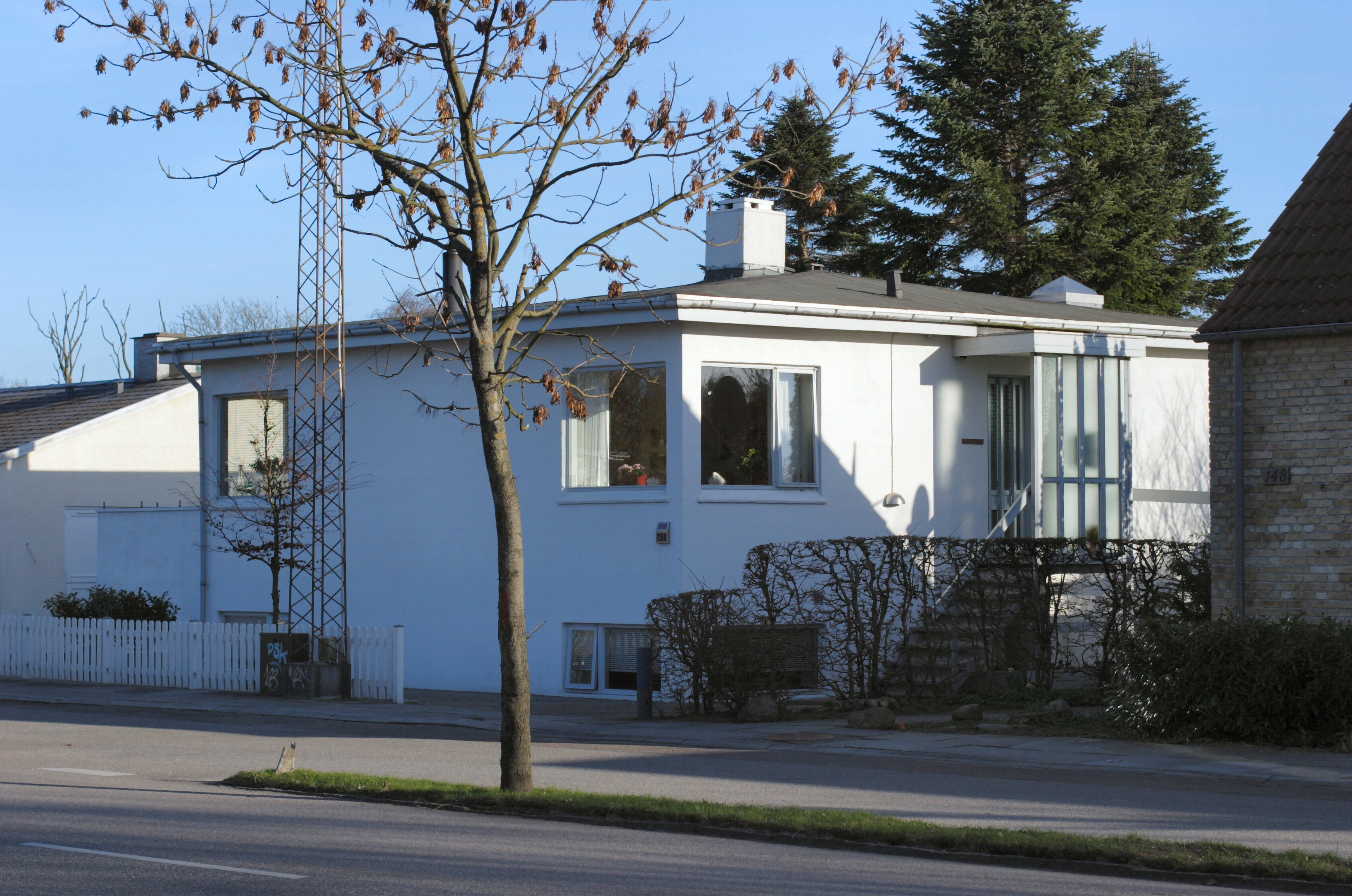 Bungalow i Risskov, Denmark